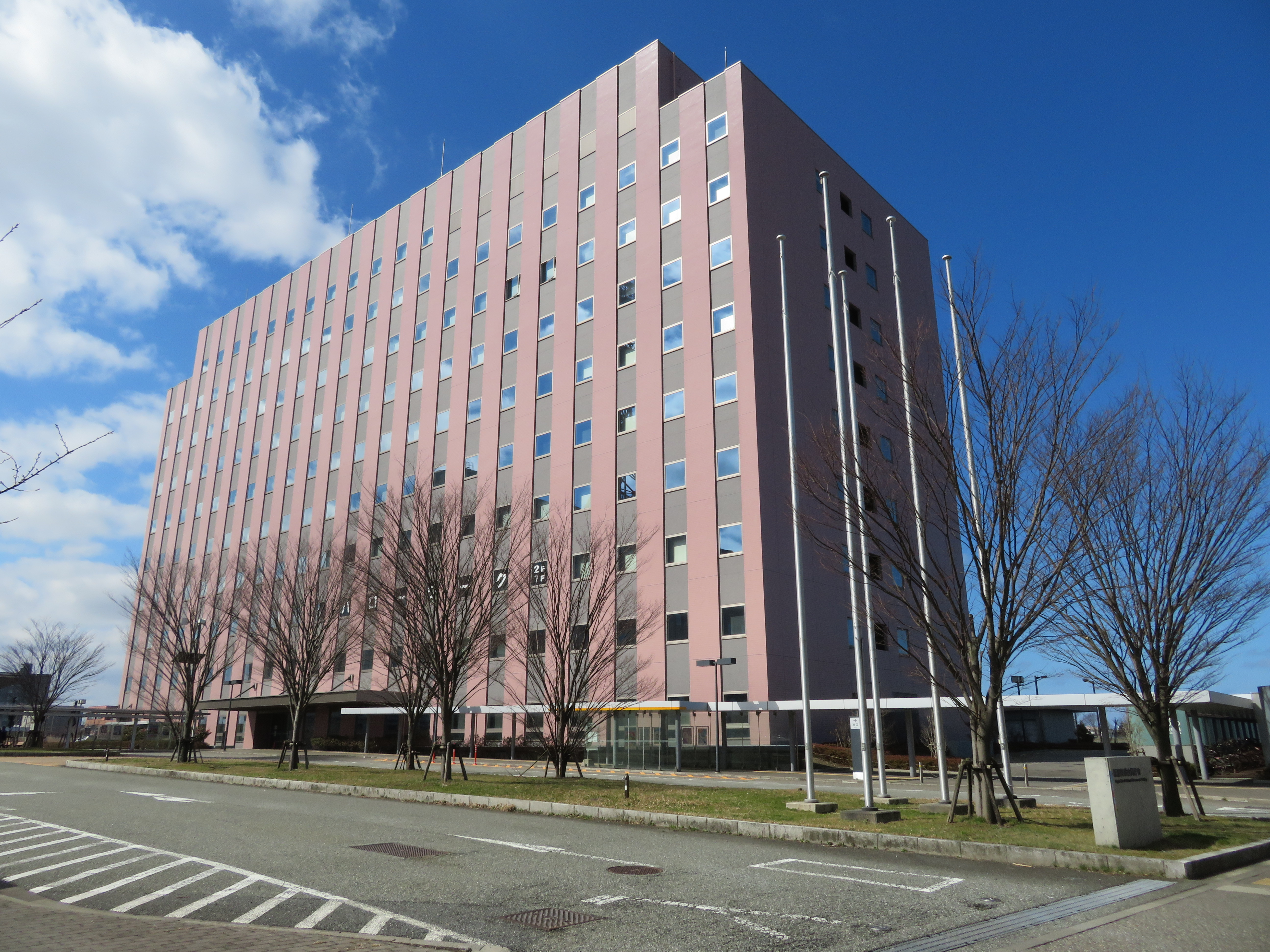 新潟市中央区に所在する新潟美咲合同庁舎2号館